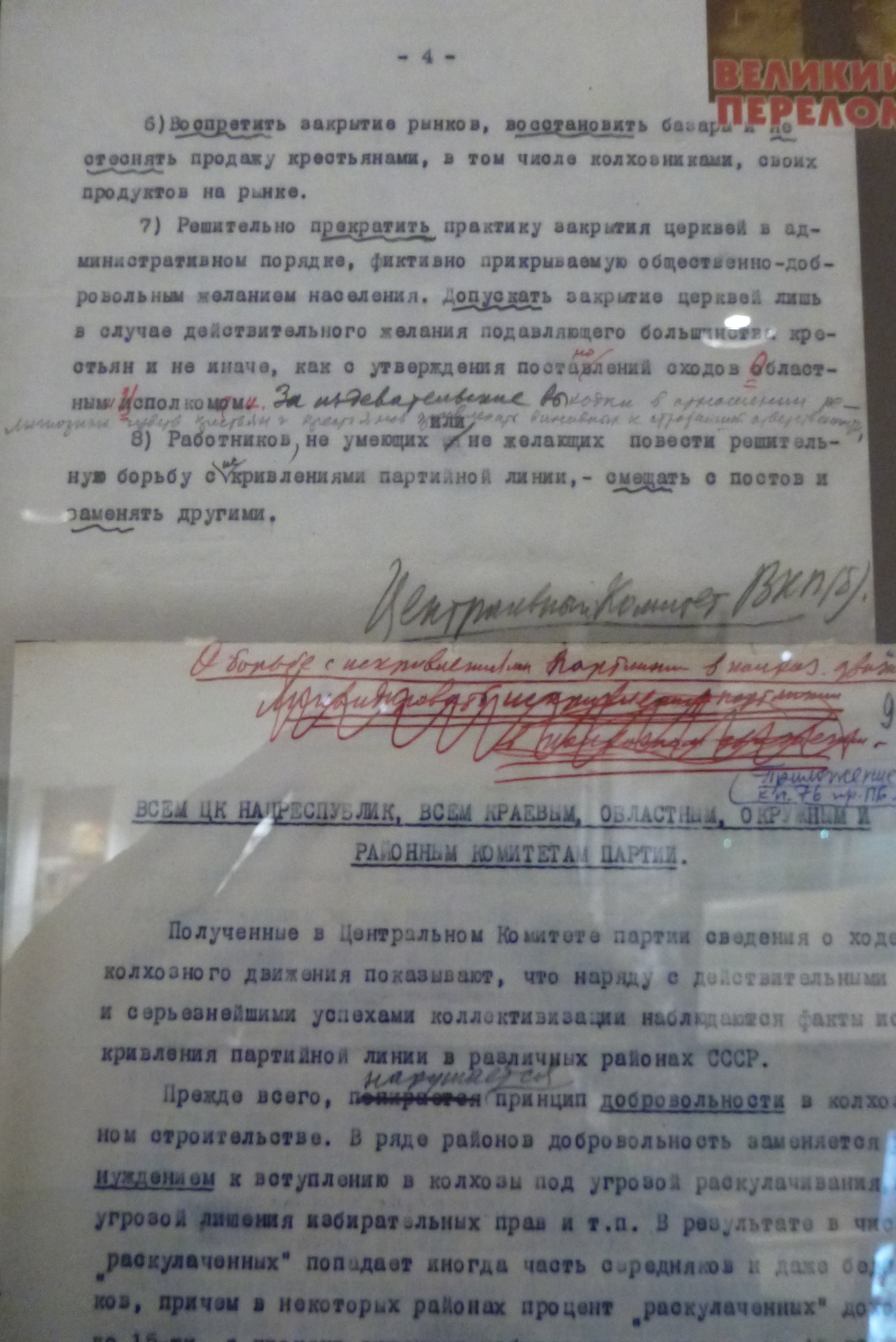 Постановление Политбюро "О борьбе с искривлениями партийной линии в колхозном движении" от 14 марта 1930 года 2 лист (автограф И.В. Сталина - правка). Хранится в РГАСПИ. Ф. 17. Оп. 163. Д. 825. Л. 93 - 96.